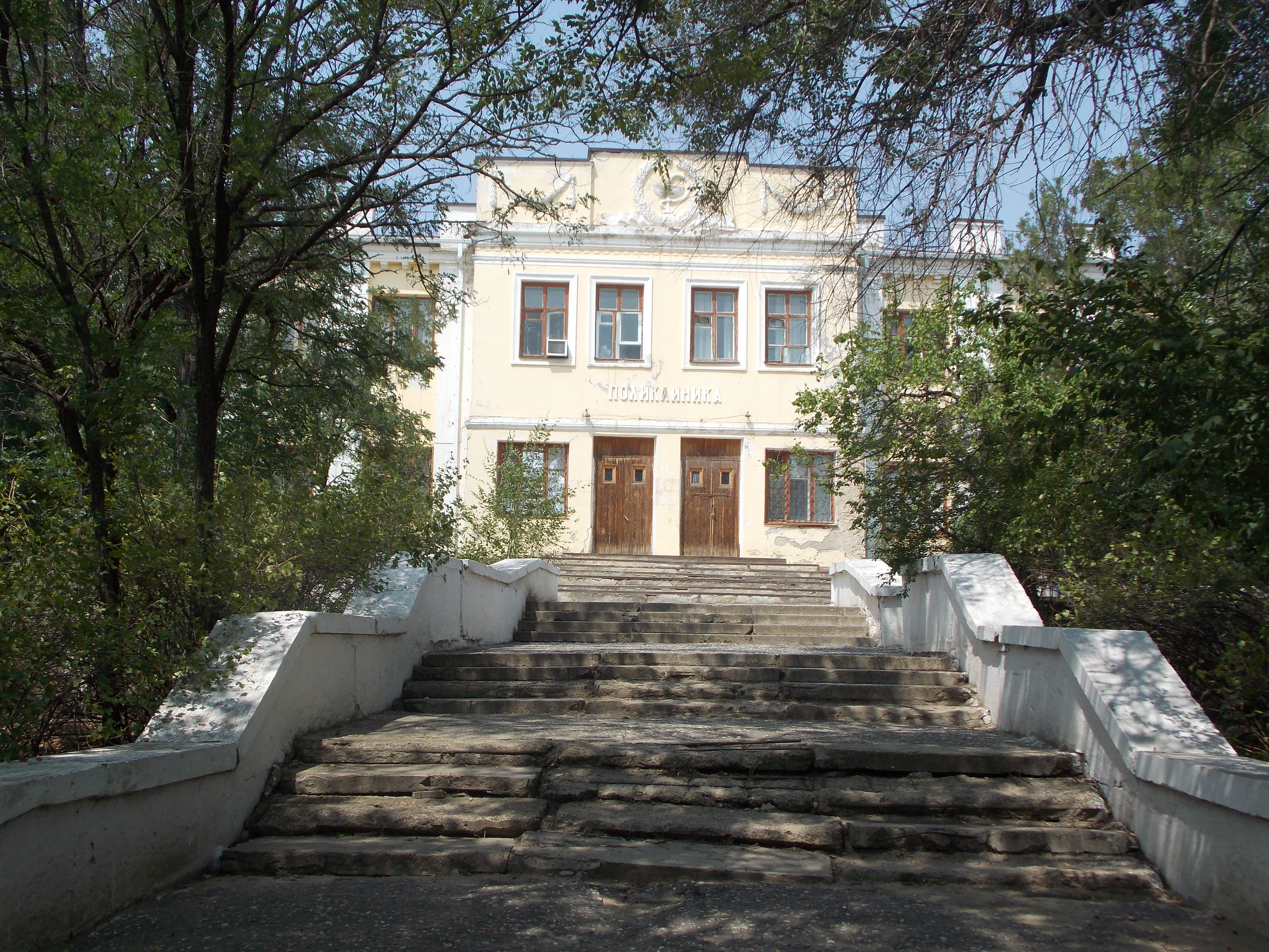 Городская поликлиника: улица Ленина, 227, Элиста, Калмыкия